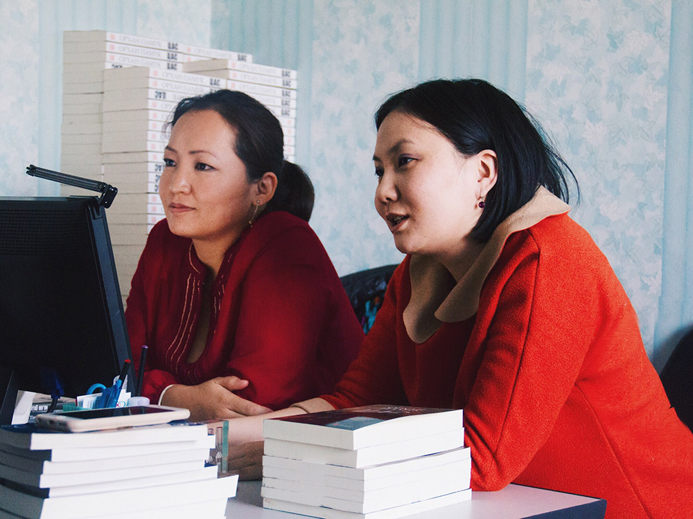 Монгол: м